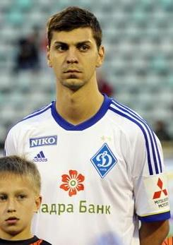 Александр Драгович - австрійський футболіст під час виступів за Динамо на фіналі Кубку України